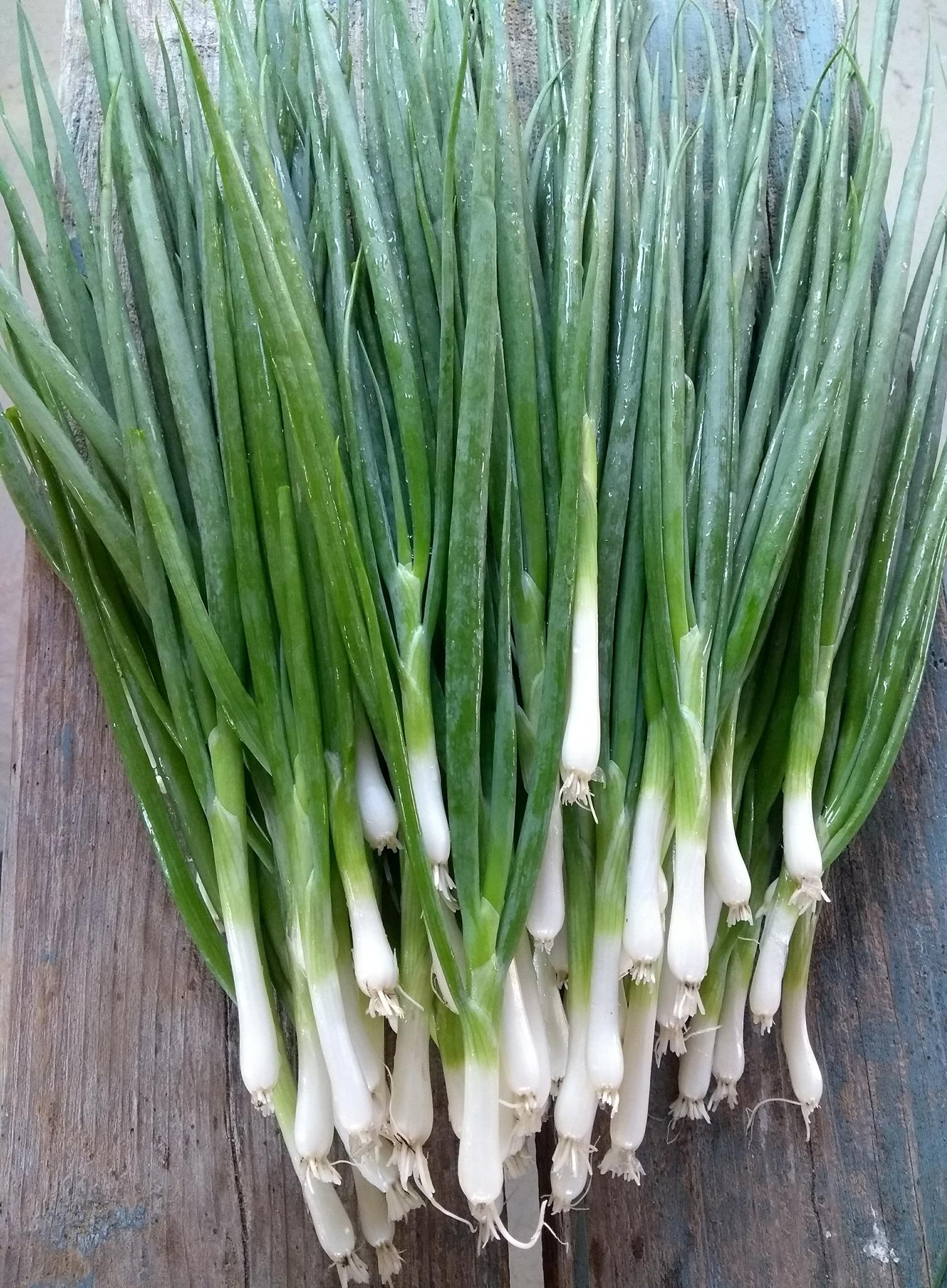 Échalotte du Québec